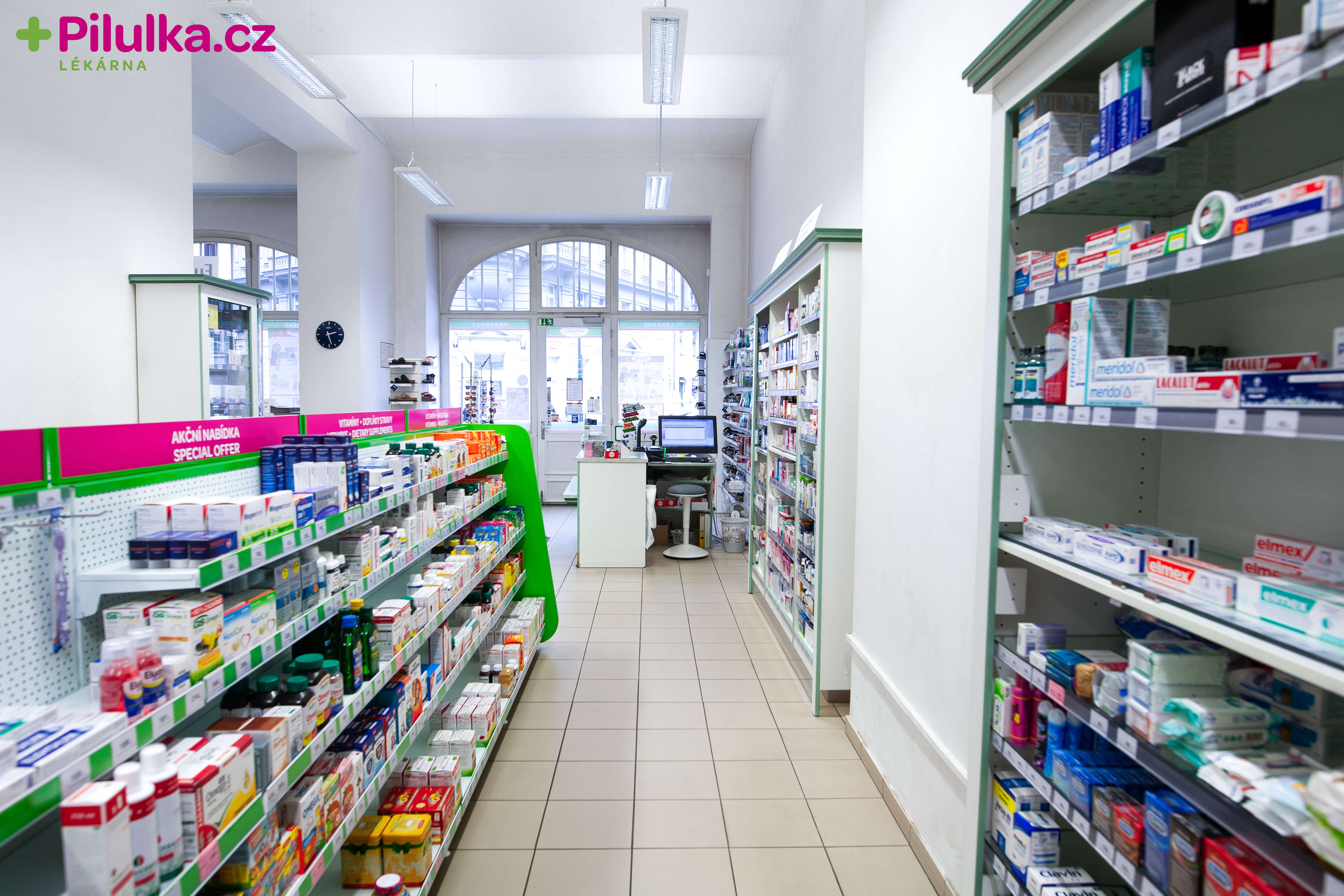 Pilulka Lékárna Praha Senovážné náměstí